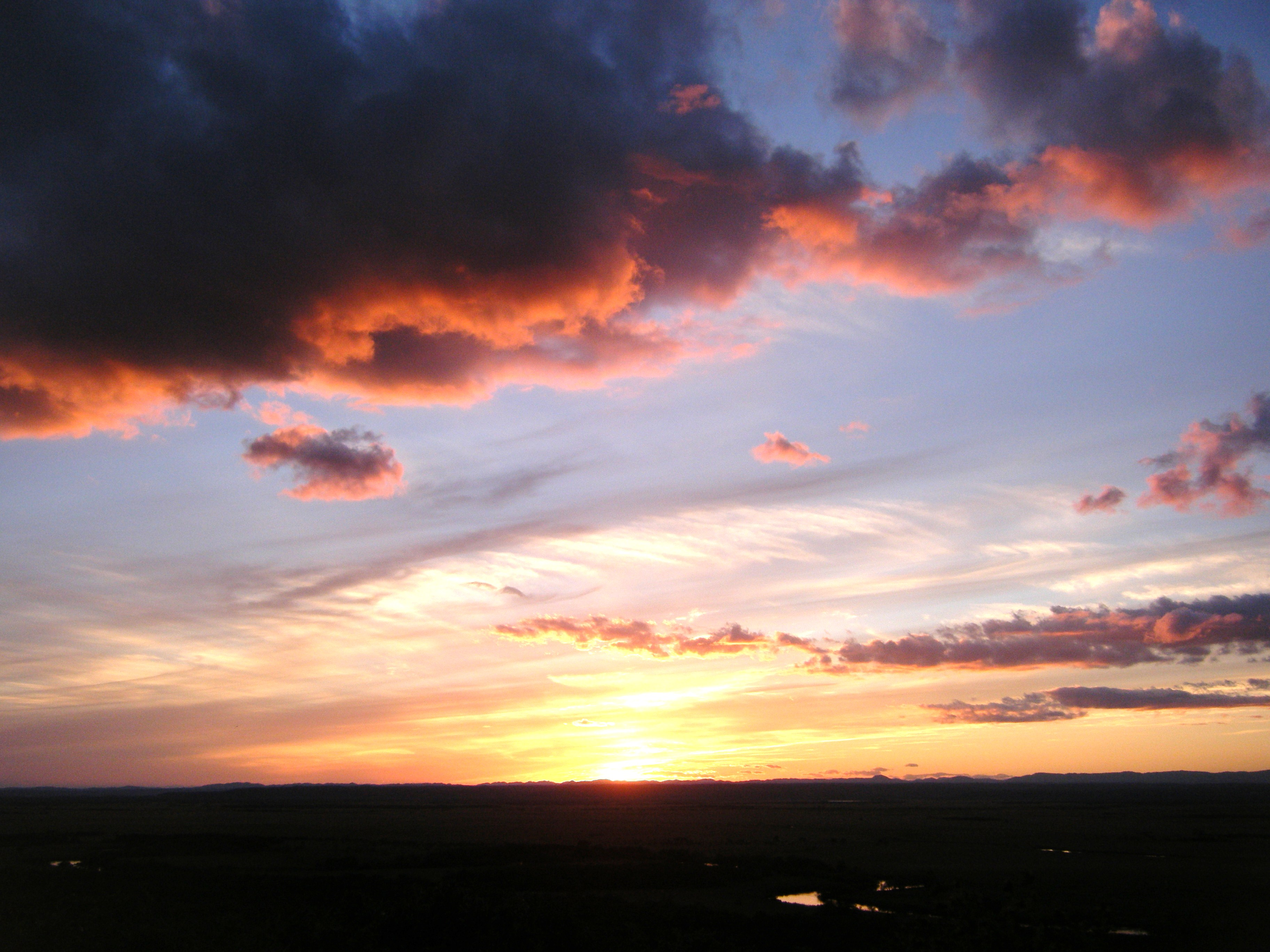 釧路湿原の夕焼け。細岡展望台より撮影。